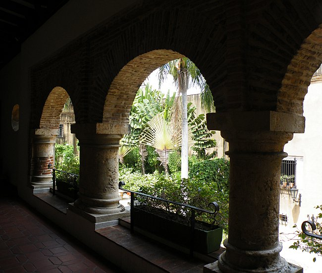 Innenhof der Casas Reales in Santo Domingo, Republica Dominicana